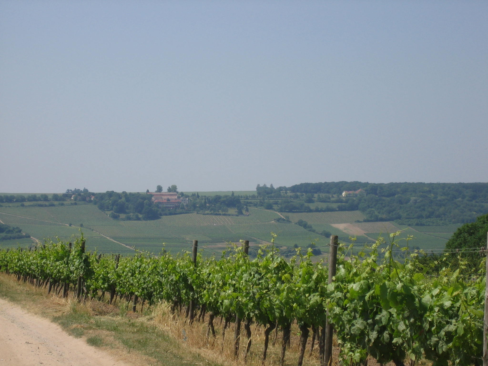 Der Westerberg von Groß-Winternheim aus gesehen